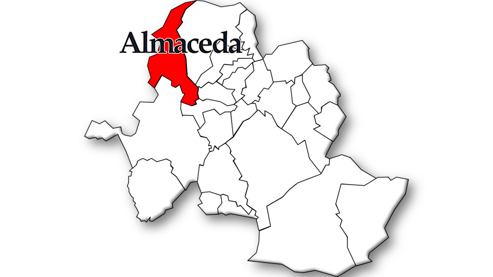 População